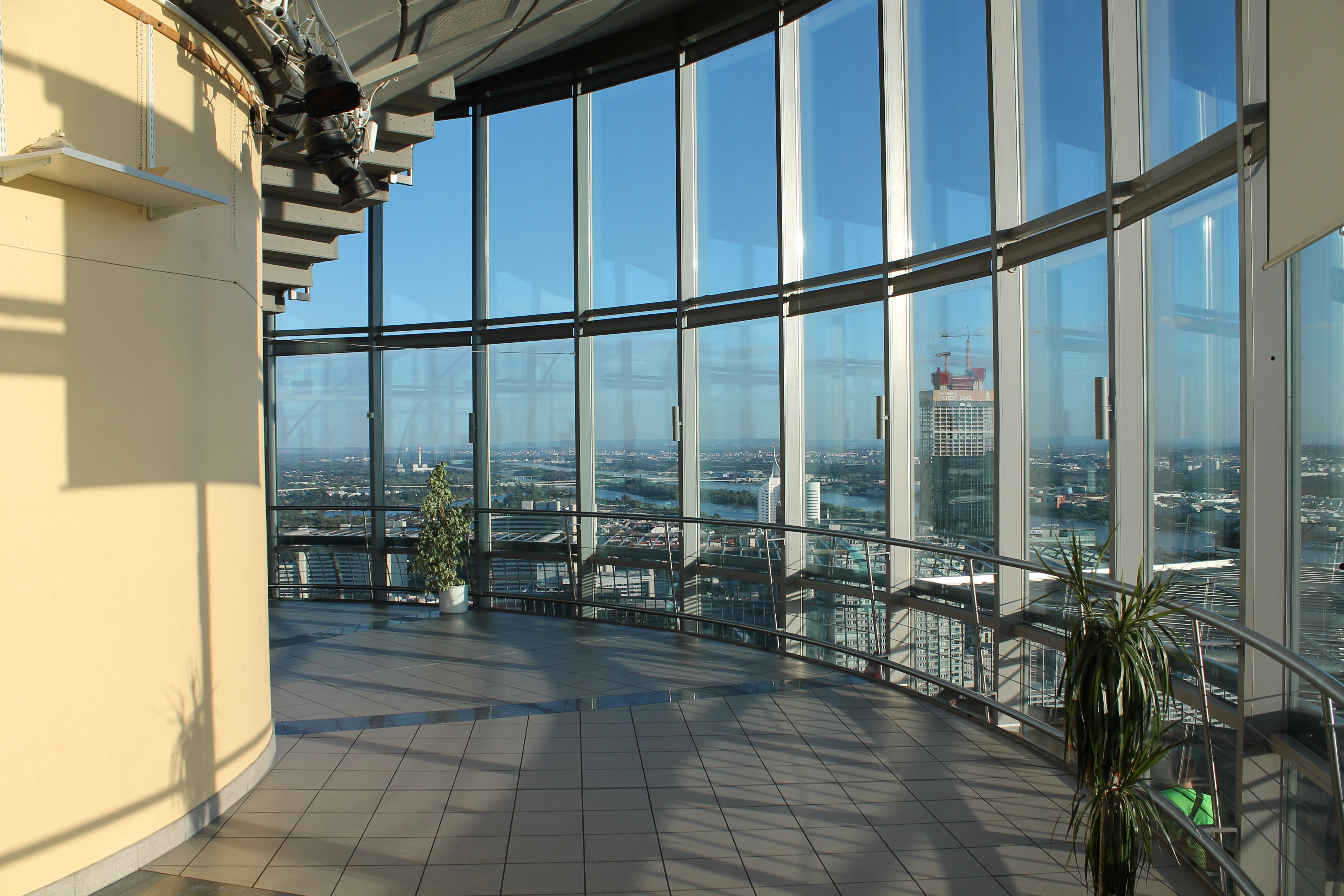 Donauturm interior